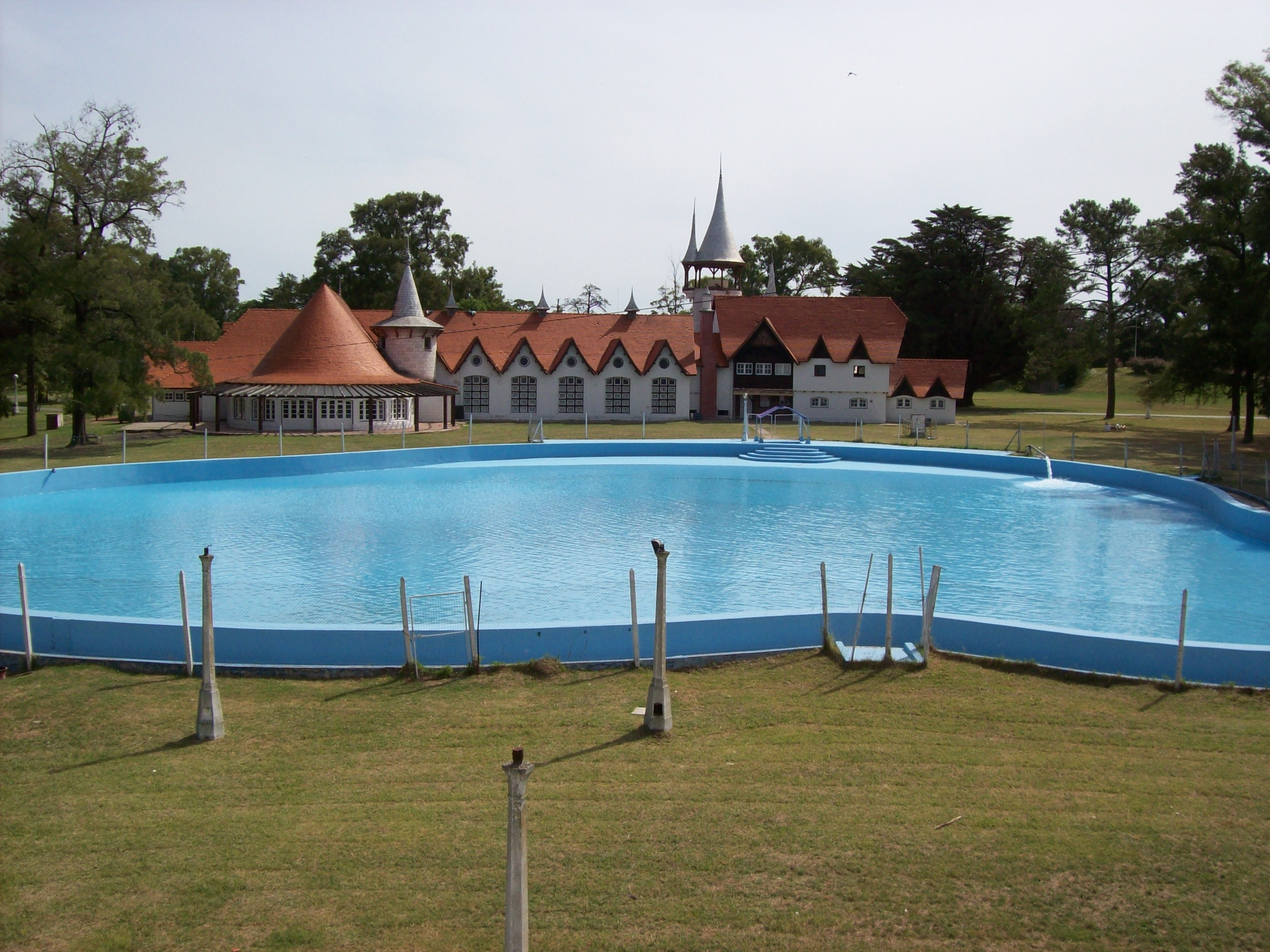 Casa del Niño y su piscina en la República de los Niños, en Gonnet, partido de La Plata, Provincia de Buenos Aires, Argentina. Dicho edificio posee espacio para alojar 120 chicos.